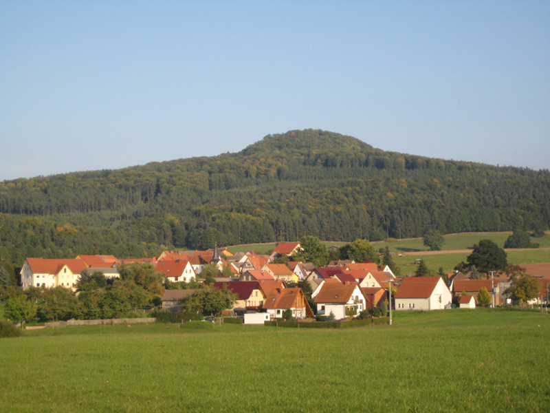 Die Stopfelskuppe über Bernshausen (Wartburgkreis)